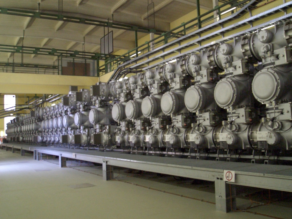 Umspannwerk Simmering, SF6-gasisolierte Schaltanlage für 110kV